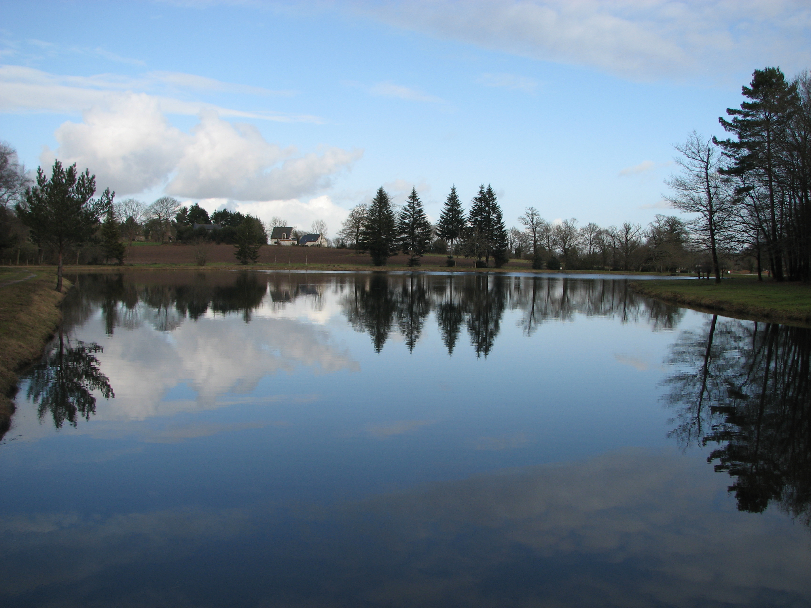 Étang aux biches à Trédion (Morbihan)